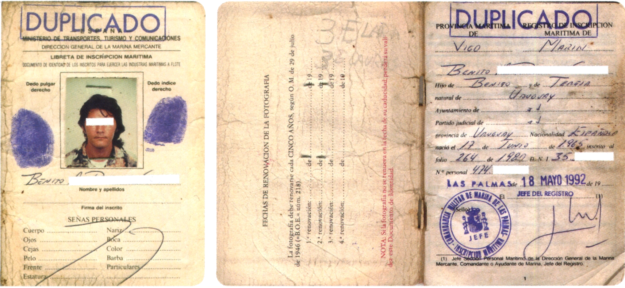 Spanisches Seemannsbuch, 1992.